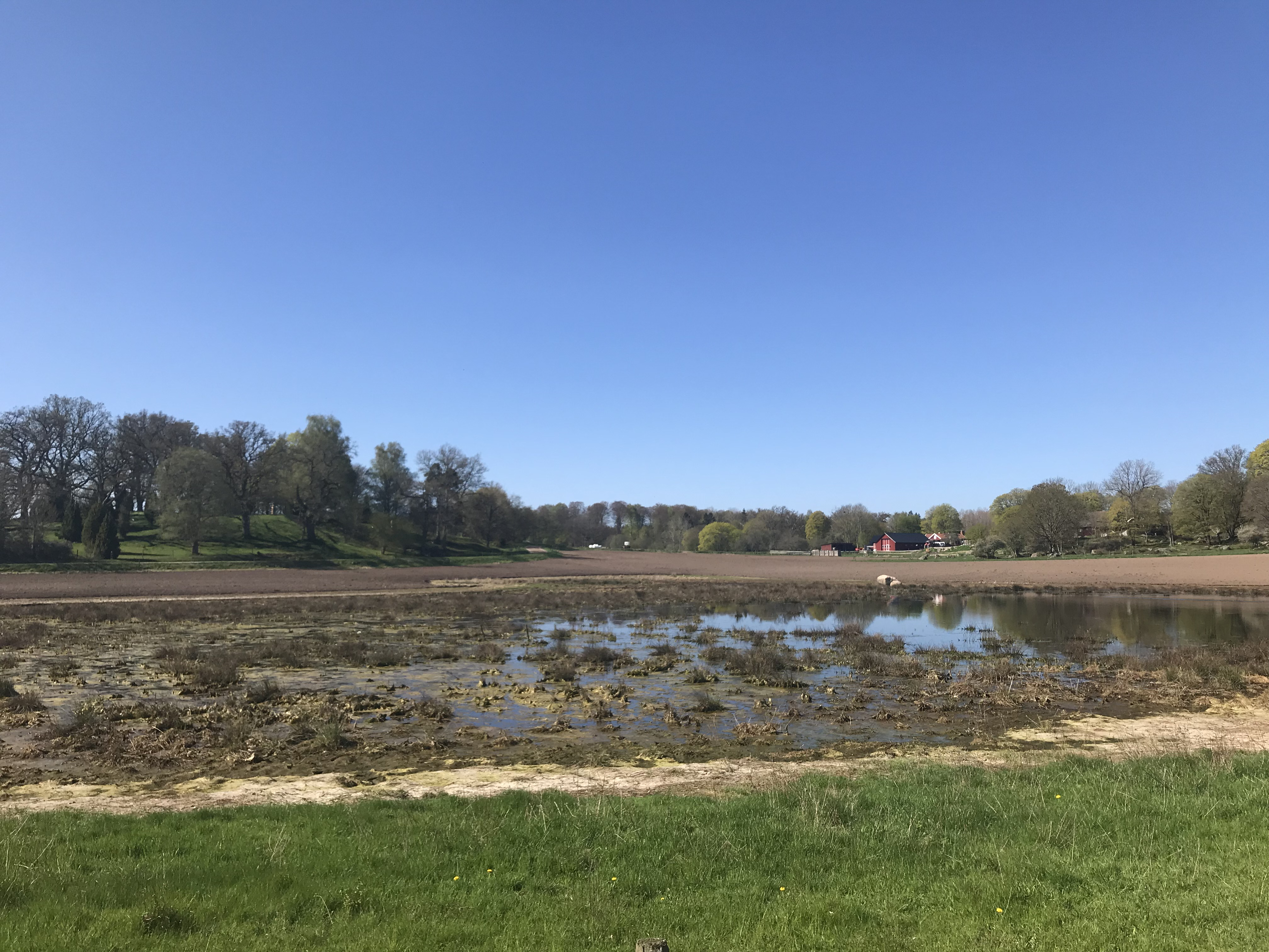 Vångboplatsen fotograferad mot SV. Till vänster syns kullen i boplatsens mitt och till höger byn Västra Vång.